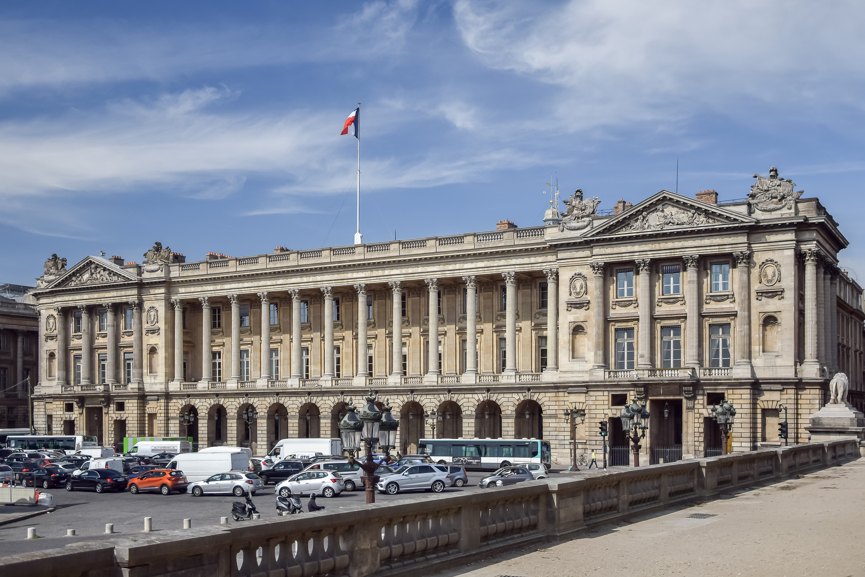 Localisation Pays : France 🇫🇷 Région : Île-de-France Département : Paris (75) Ville : Paris (75000) Quartier : 8ᵉ arrondissement Adresse : 2, rue Royale / place de la Concorde Présentation Fonction : Bureaux Style : Néoclassique Architecte : Jacques-Ange Gabriel Construction : 1757 → 1774 Statut patrimonial : Classé Monument historique (1923) Données techniques Niveaux : R+3 Hauteur : 20.00 m